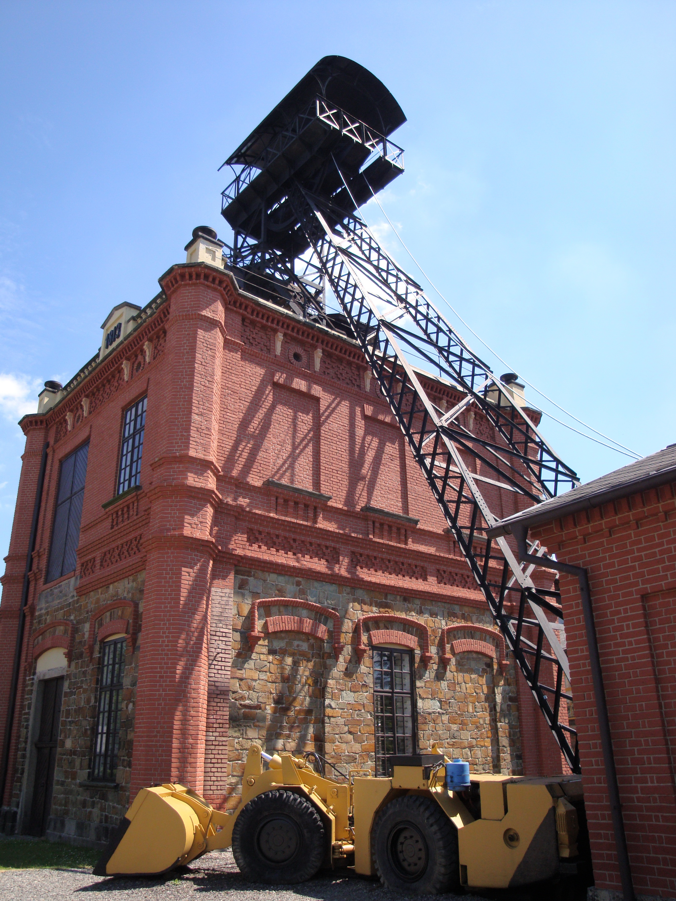 Těžní věž Ševčínského dolu v Příbrami